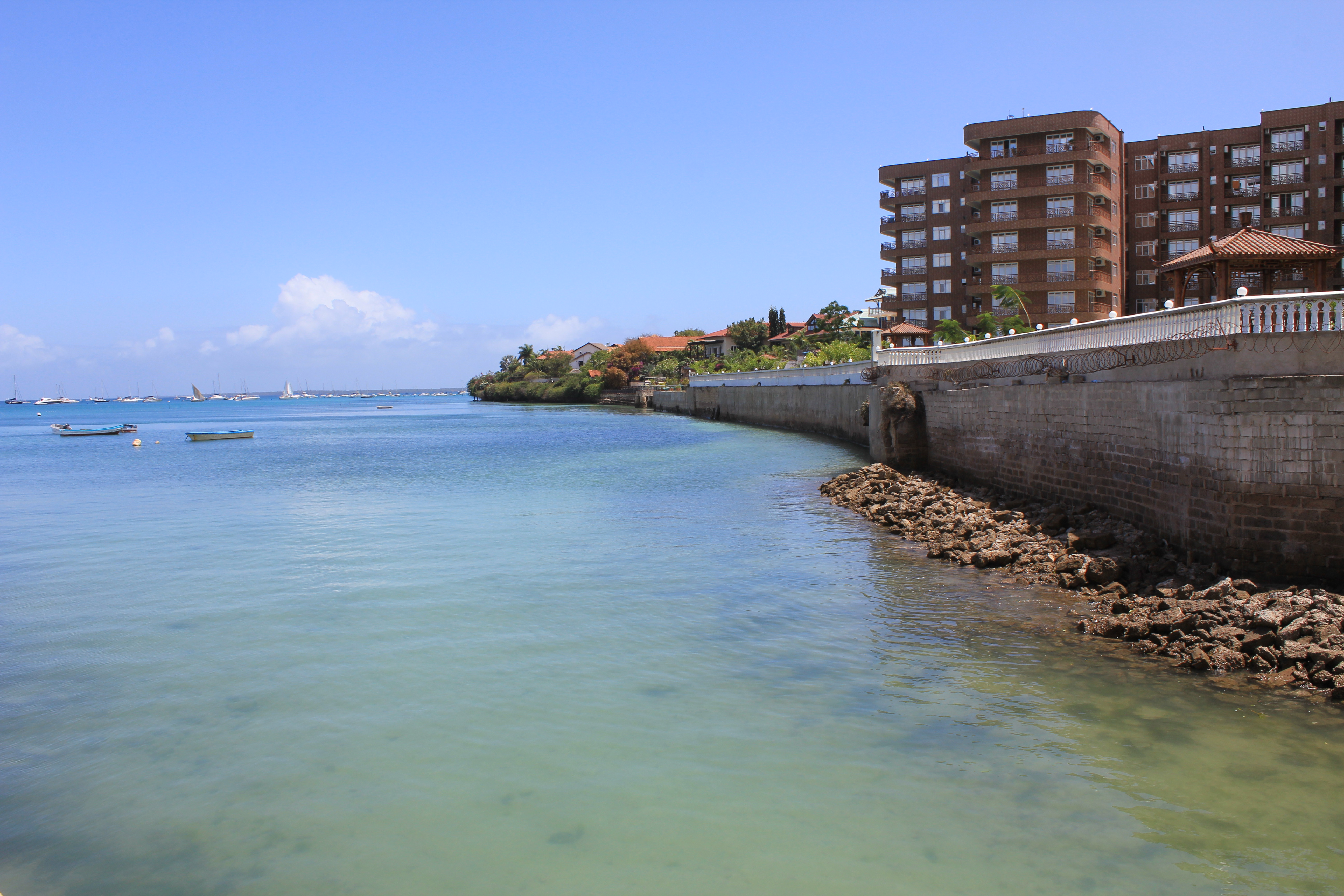 Masaki, Dar es Salaam, Tanzania